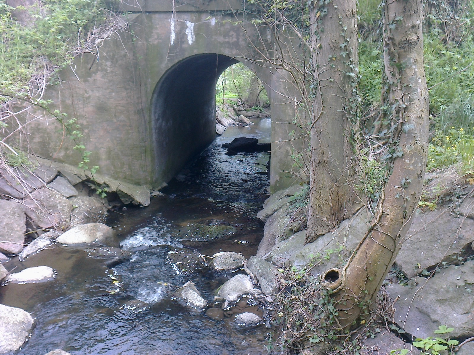 Stien krydser KampeløkkeÅ på denne bro